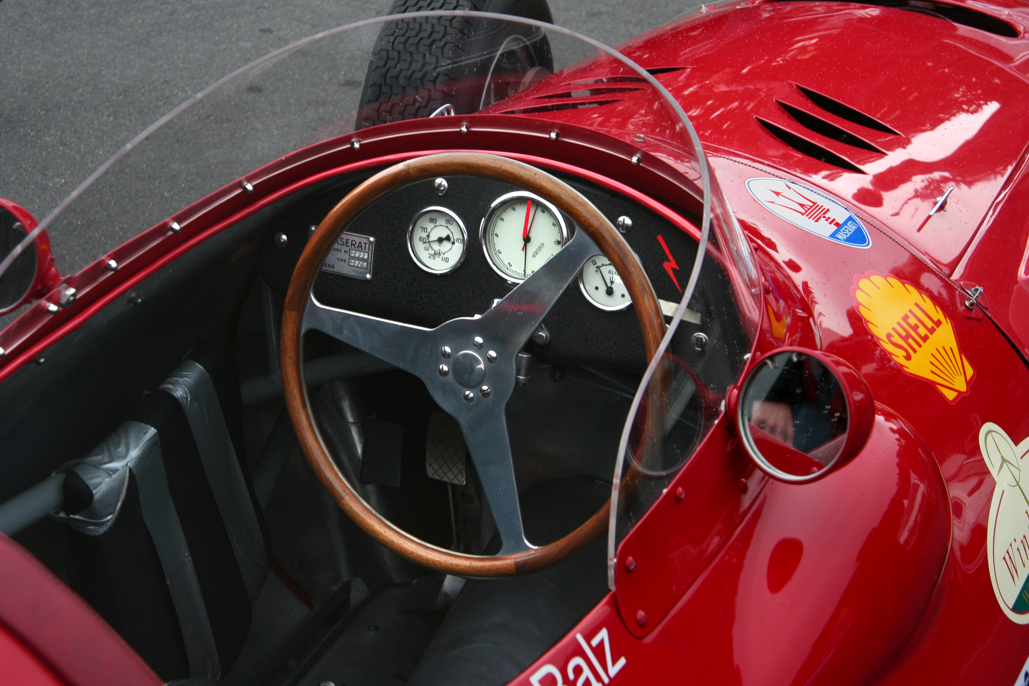 Cockpit des Maserati 250 F(Baujahr 1958) von Willi Balz beim AvD-Oldtimer-Grand-Prix